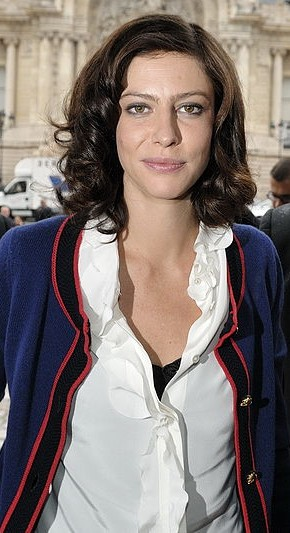 Défilé Channel printemps/été 2010 prêt-à-porter au Grand Palais (Avenue du Général Eisenhower - Paris 75008) Karl Lagerfeld a fait fort, en transformant le Grand Palais en étable géante. Des People en pagaille emmenés par Lily Allen (ambassadrice de la ligne Coco Cocoon) suivi de Bernadette Chirac, Claudia Schiffer, Rihanna, Virginie Ledoyen, Anna Wintour, Sean Lennon et Charlotte Kemp Muhl, Marie-Josée Croze, Prince accompagné de sa fiancée, et Irina Lazareanu, l'ex de Pete Doherty.